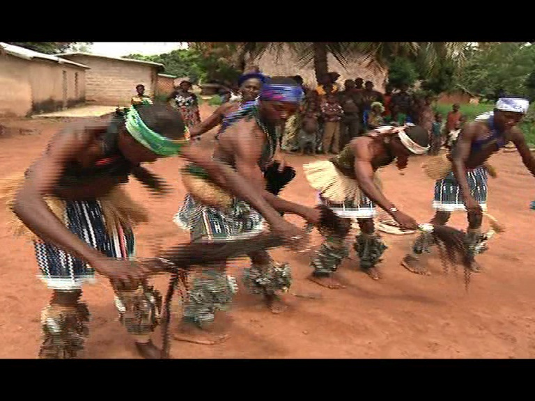 le gbofe d afounkaha